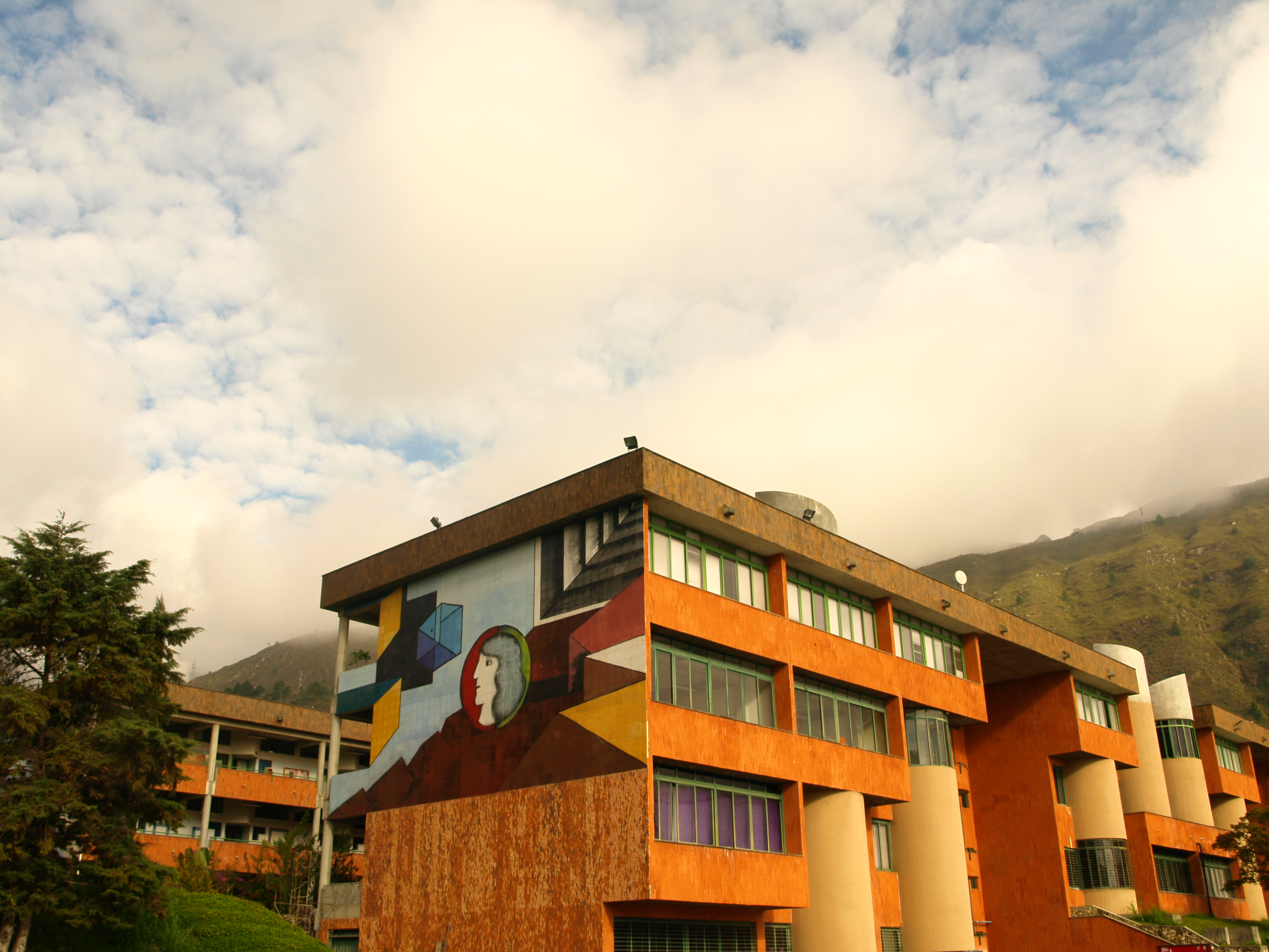 (08/368) Vista parcial de la Facultad de Arquitectura y Diseño de la Universidad de Los Andes, en Mérida, Venezuela. En la fachada se estrena el mural del artista venezolano Zapata.